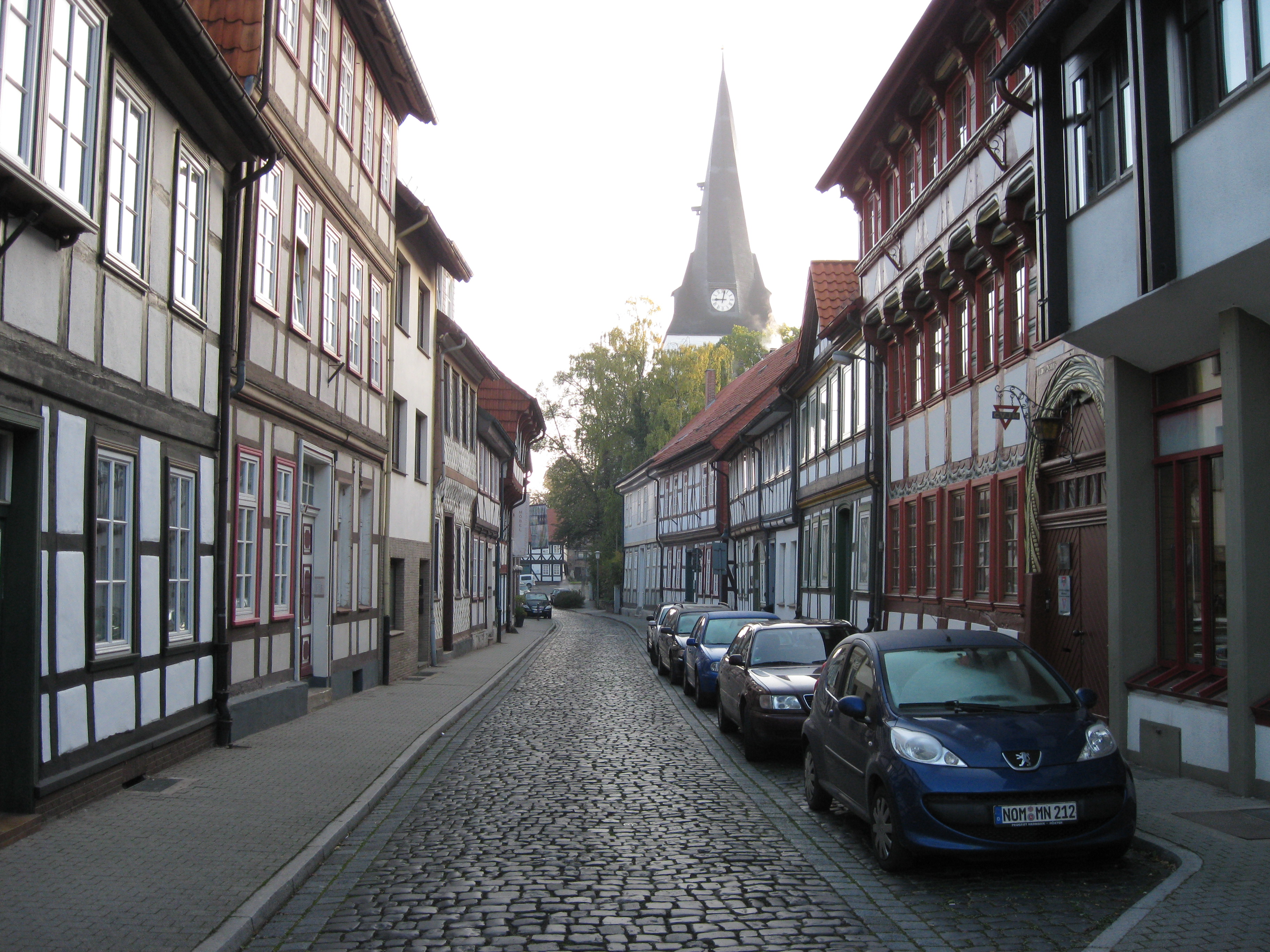 Hagenstrasse, Northeim, tyskland